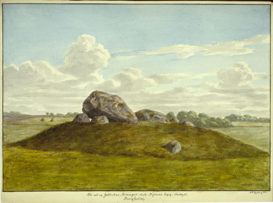 Akvarel af A. P. Madsen 1885. Jættestue, Arnager på Bornholm, matr. 15a